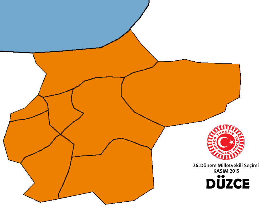 Kasım 2015 seçimleri